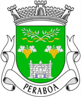 Brazão da Freguesia de Peraboa - Simbulos maiores da Freguesia - Fonte Velha, Azeite e Vinho